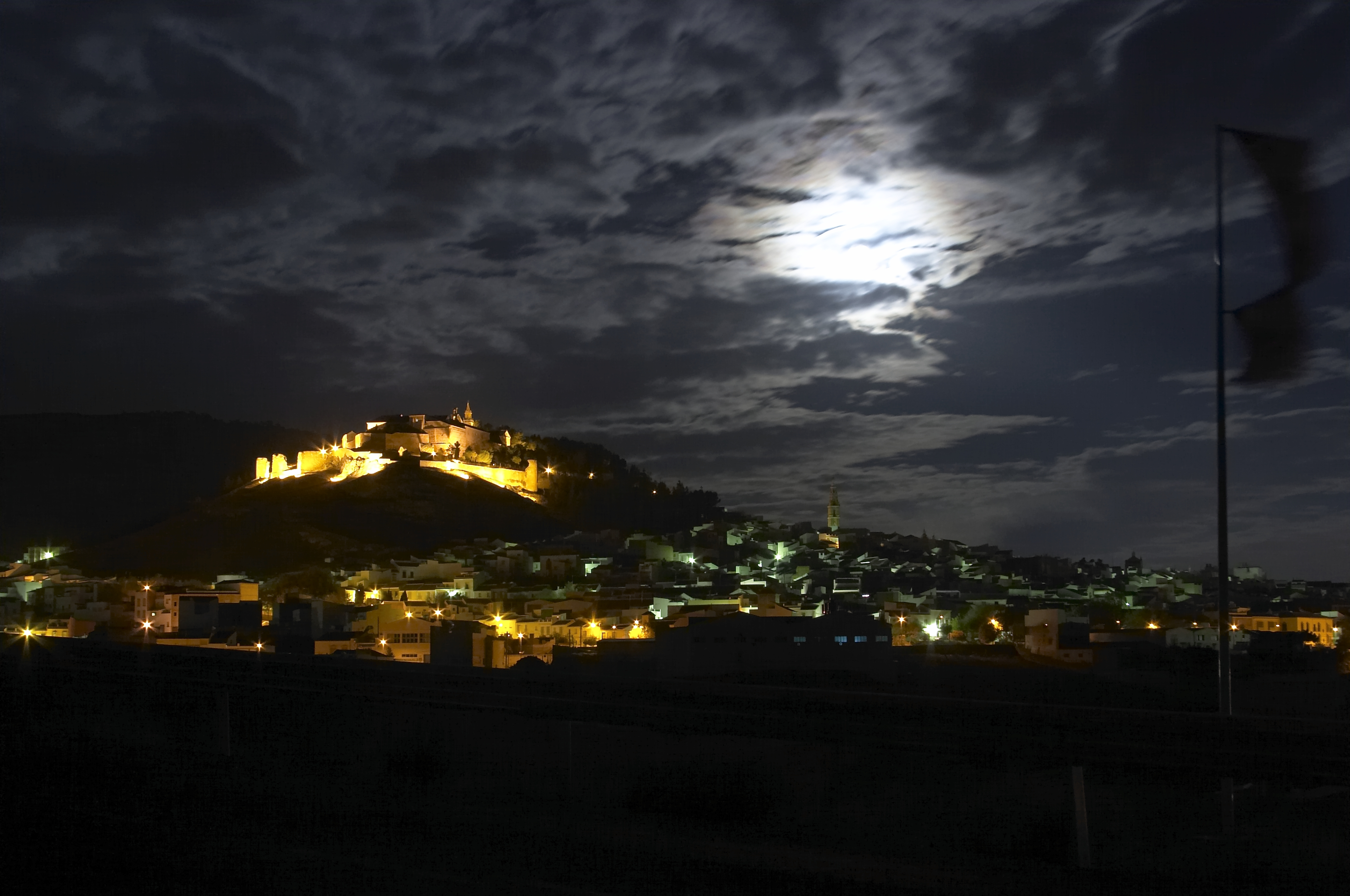 Cerro San Cristobal, desde la carretera que dirije hacia La Salada